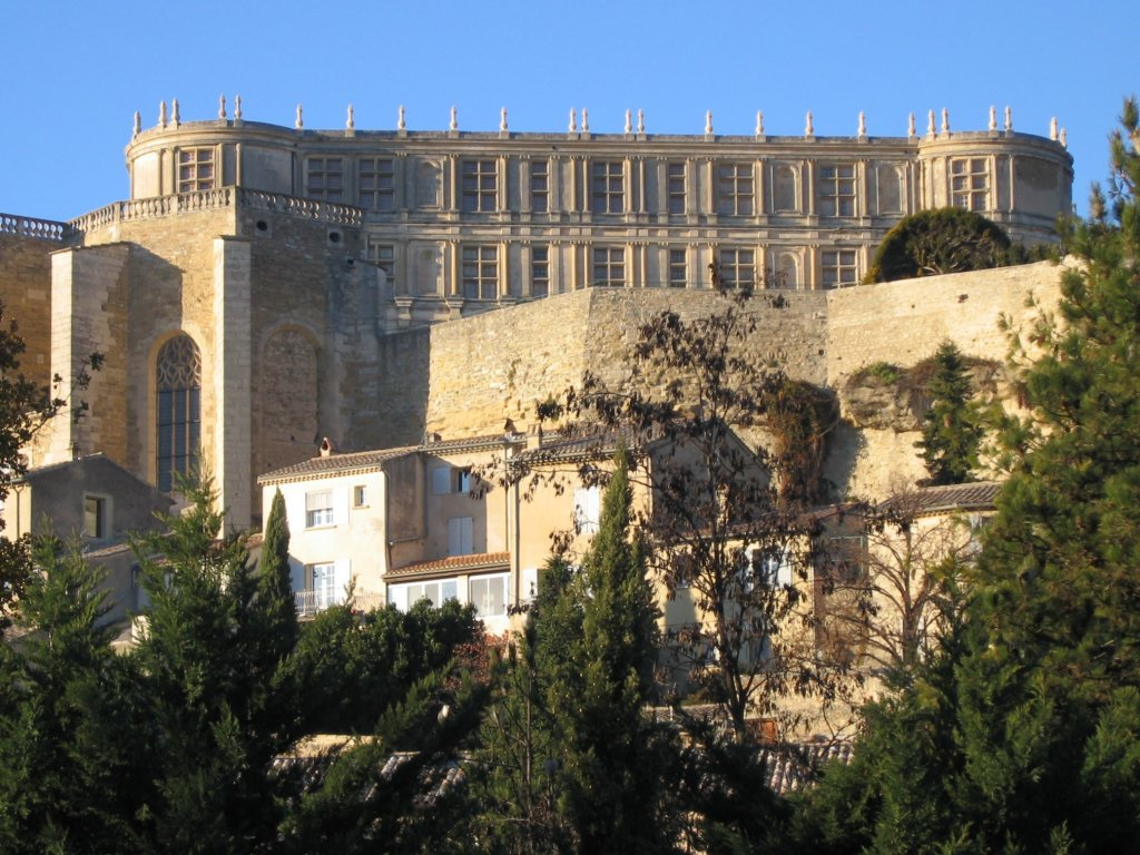 La chateau de Grignan (Drôme, France)